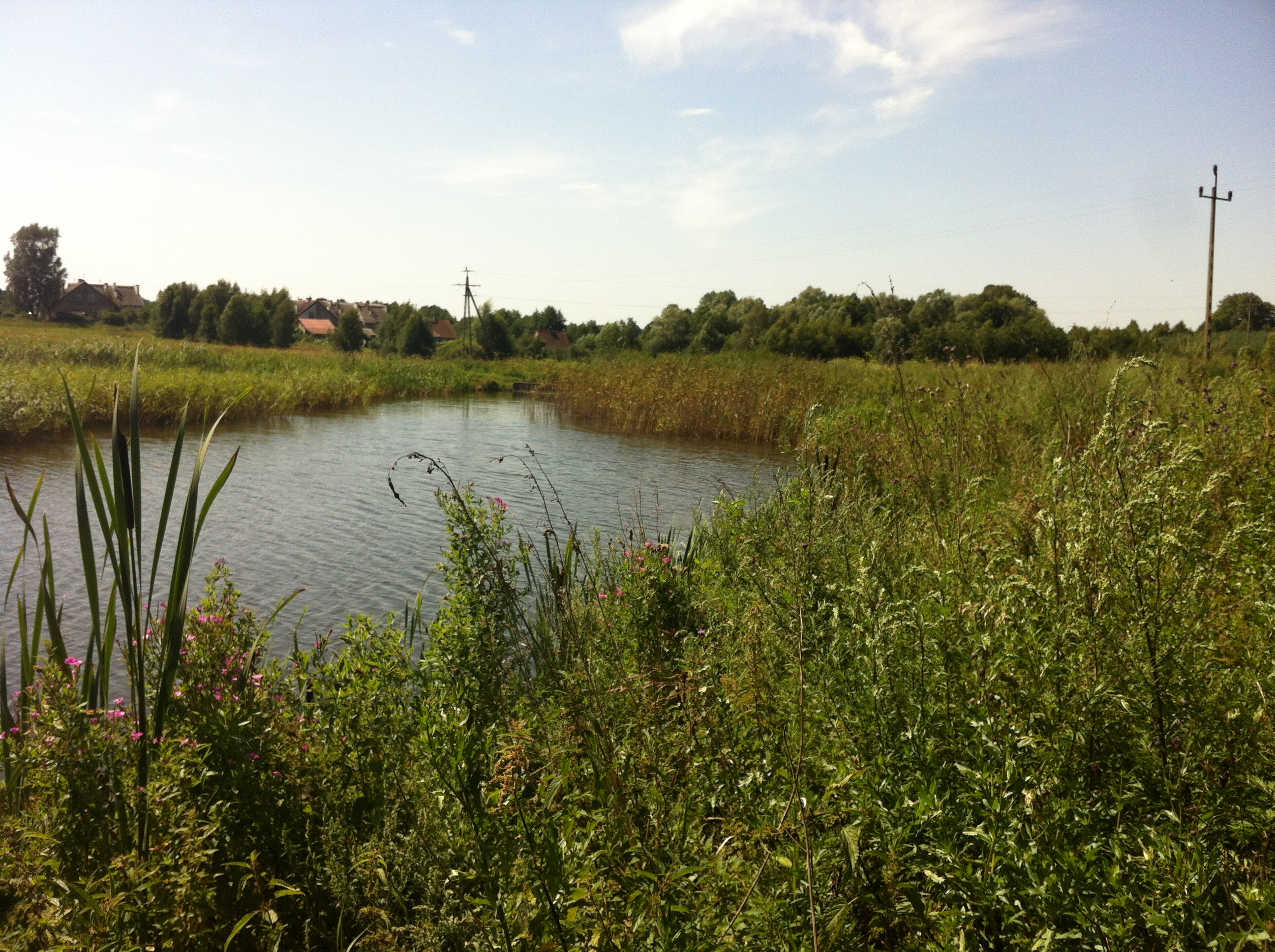 Staw w Srokowskim Dworze, dawnym folwarku Drengfurtshof